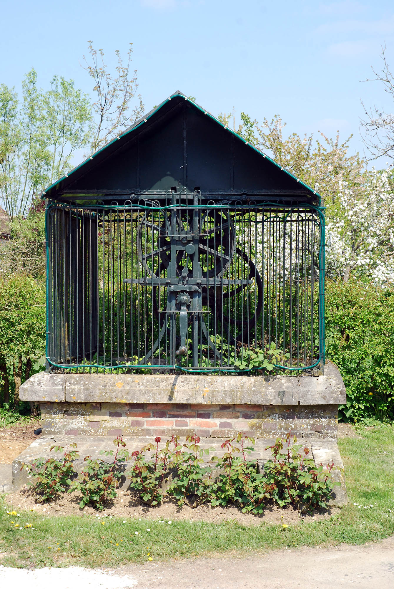 Un ancien puits aux Clérimois (Yonne France)